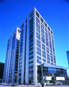 電気ビル南館写真